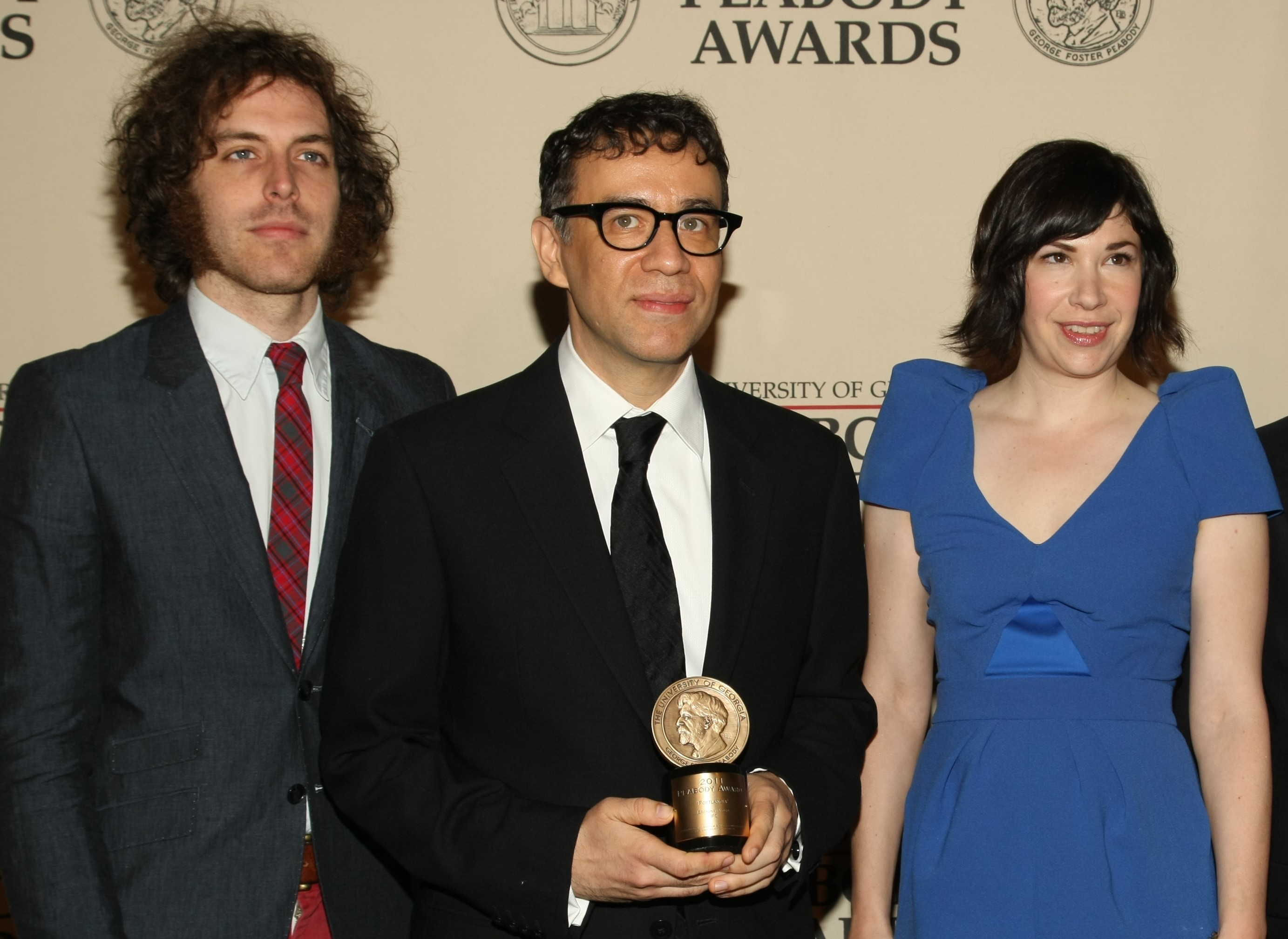 PHOTO CREDIT: ANDERS KRUSBERG / PEABODY AWARDS Jonathan Krisel, Fred Armisen, Carrie Brownstein 71st Annual Peabody Awards Luncheon